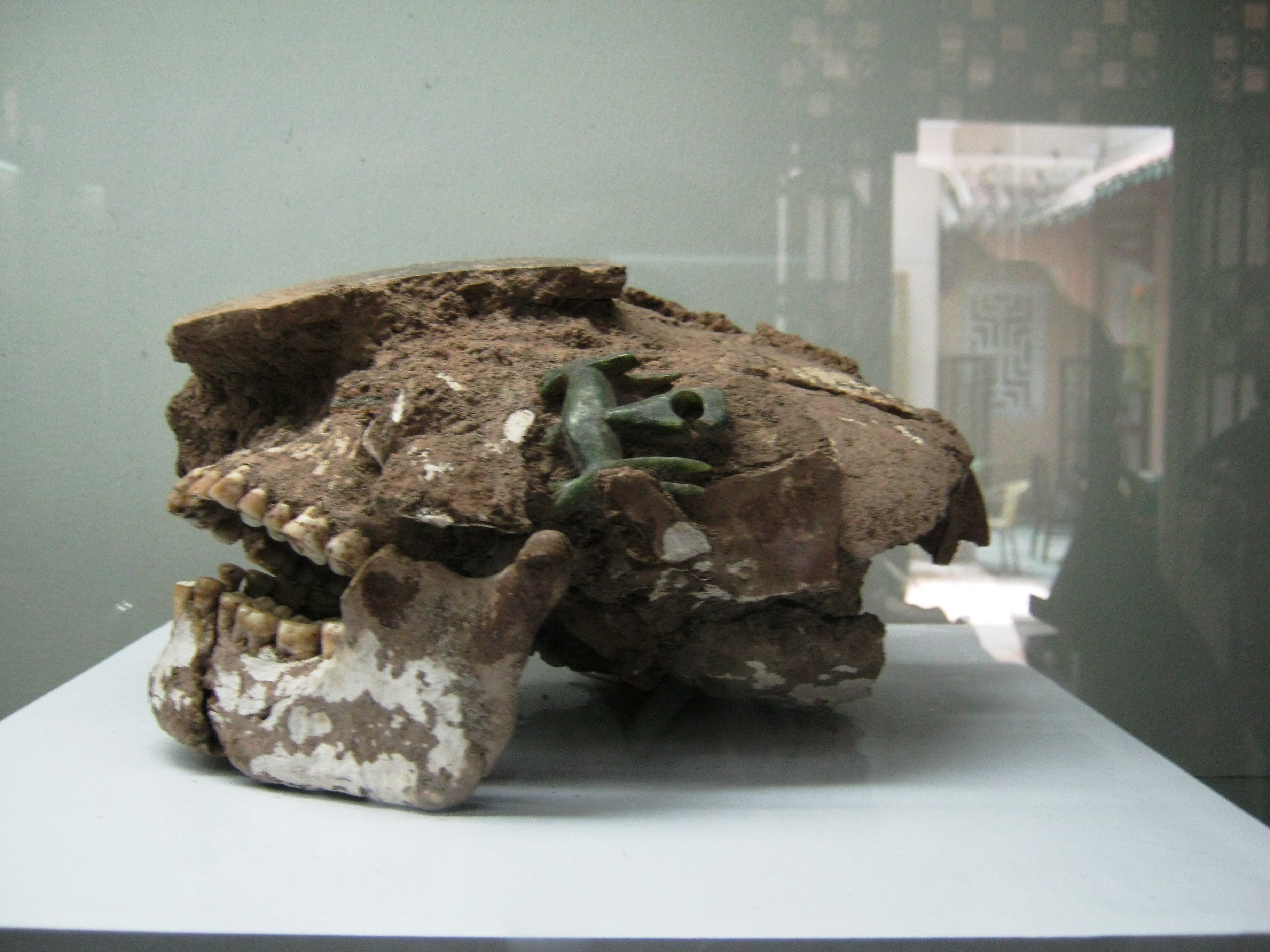 Sọ người với khuyên tai hình hai đầu thú cách nay khoảng 2. 000 năm được tìm thấy tại Cần Giờ (Thành phố Hồ Chí Minh), hiện đang trưng bày trong phòng Văn hóa Óc Eo thuộc Bảo tàng lịch sử Việt Nam tại Sài Gòn.